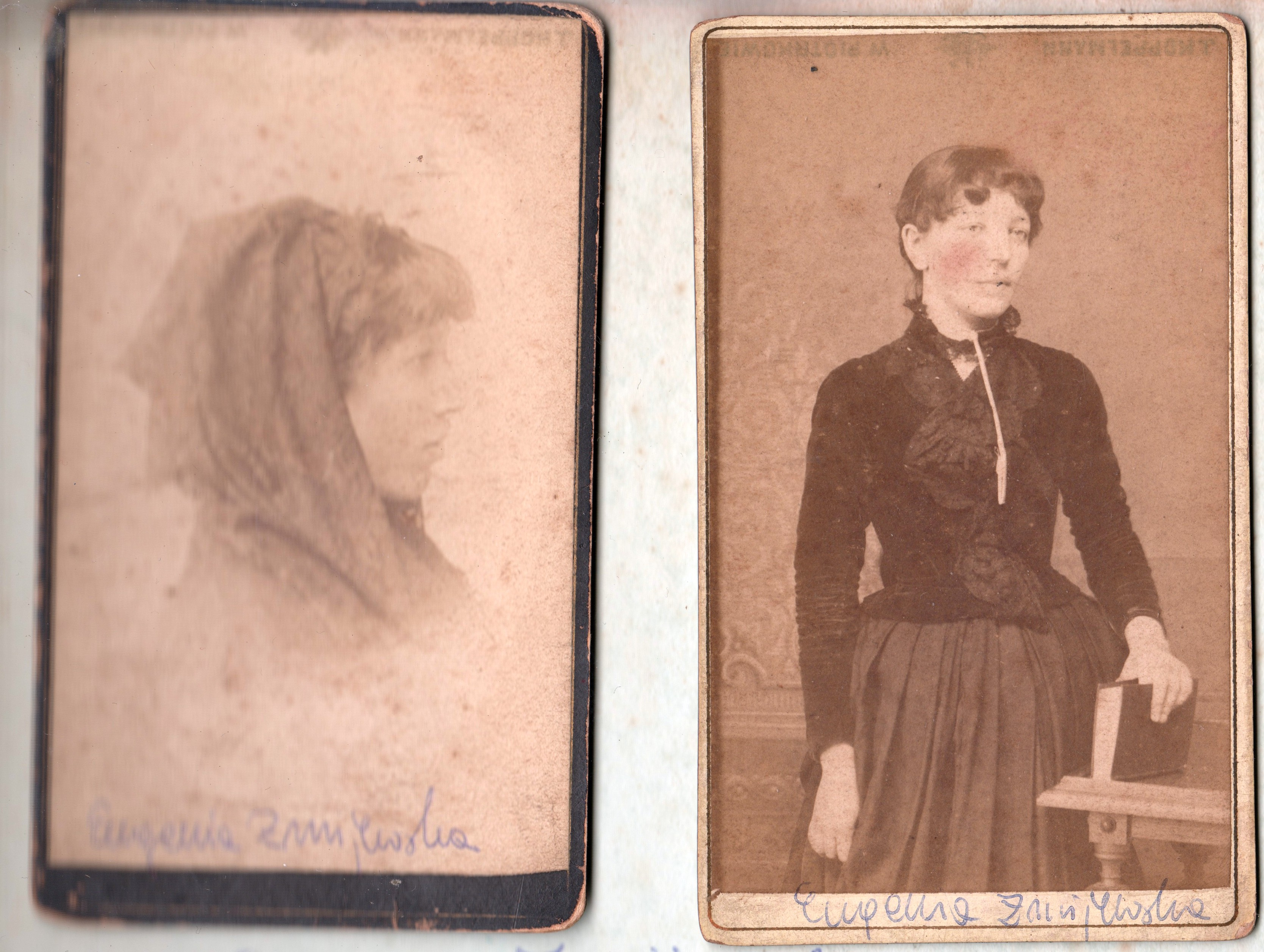 Eugenia Żmijewska (1865-1923) - polska publicystka, powieściopisarka i tłumaczka.